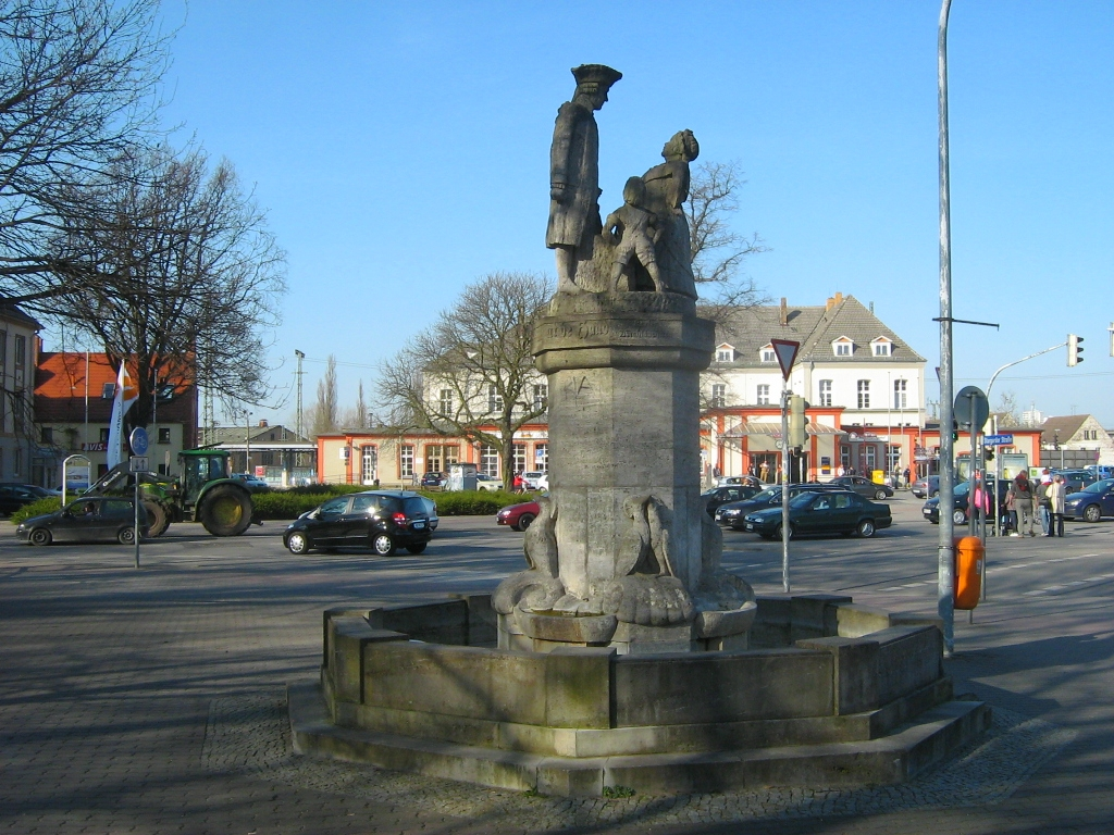 Der Dörchläuchtingbrunnen (Mudder-Schulten-Brunnen) in Neubrandenburg - 1923 geschaffen von Wilhelm Jaeger mit Figuren des Romans „Dörchläuchting“ (1866) von Fritz Reuter.